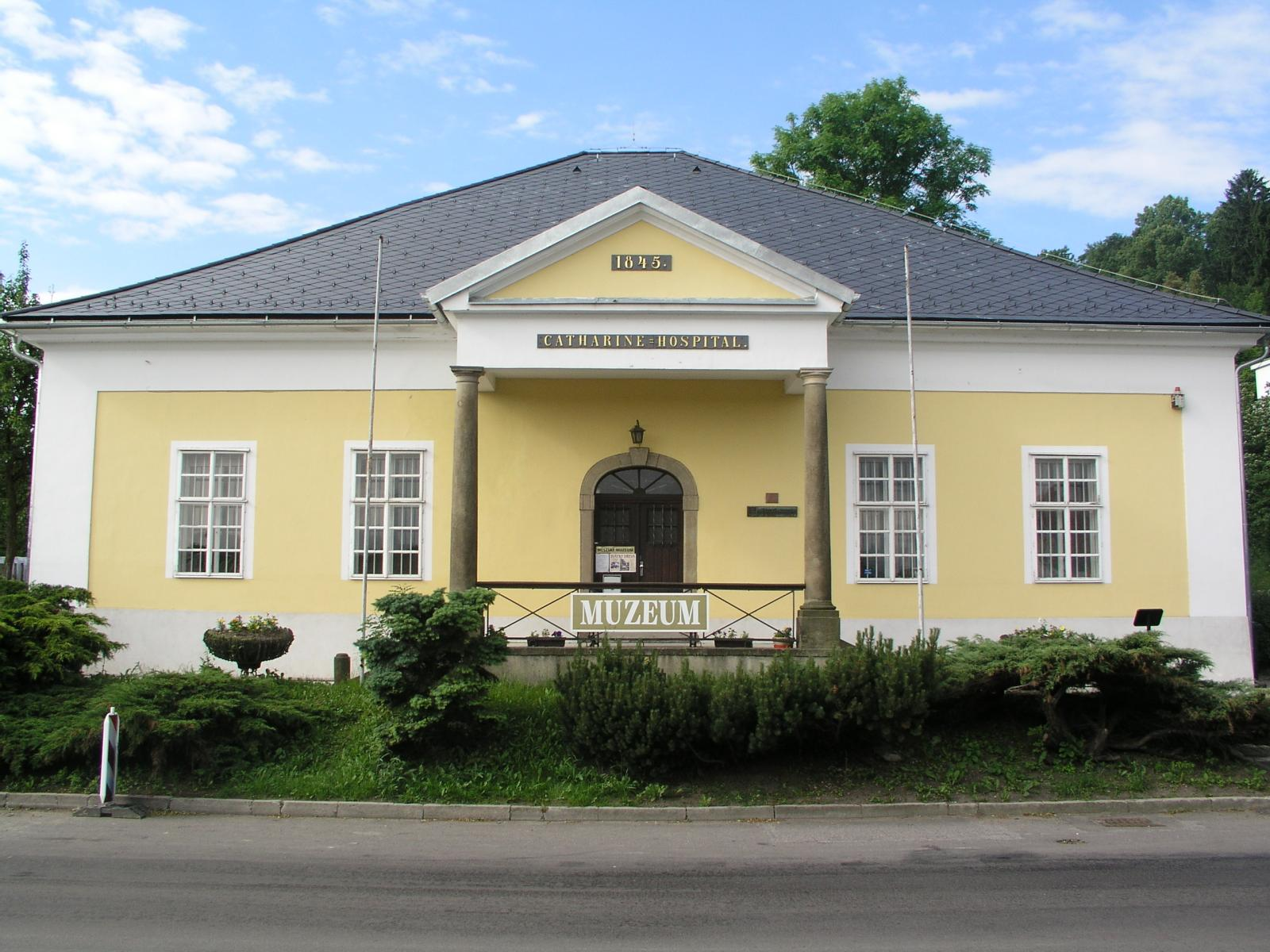 Kateřínský špitál v Žamberku.